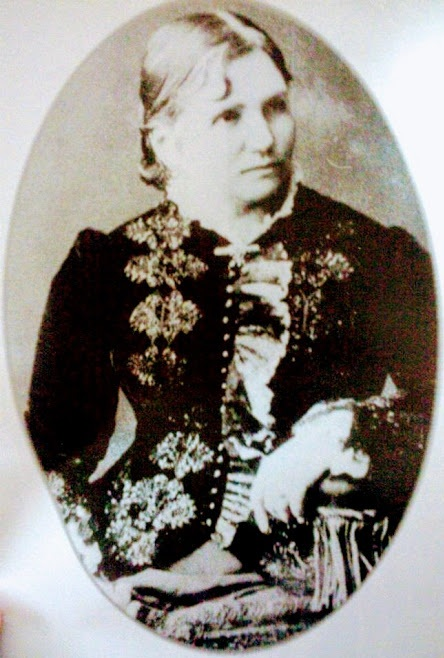 Doña Waldina Cano Augier de Navarro, poderosa terrateniente, hija del Gob. D. José Luis Cano Valdes, y Doña Bernardina Augier y Correa.